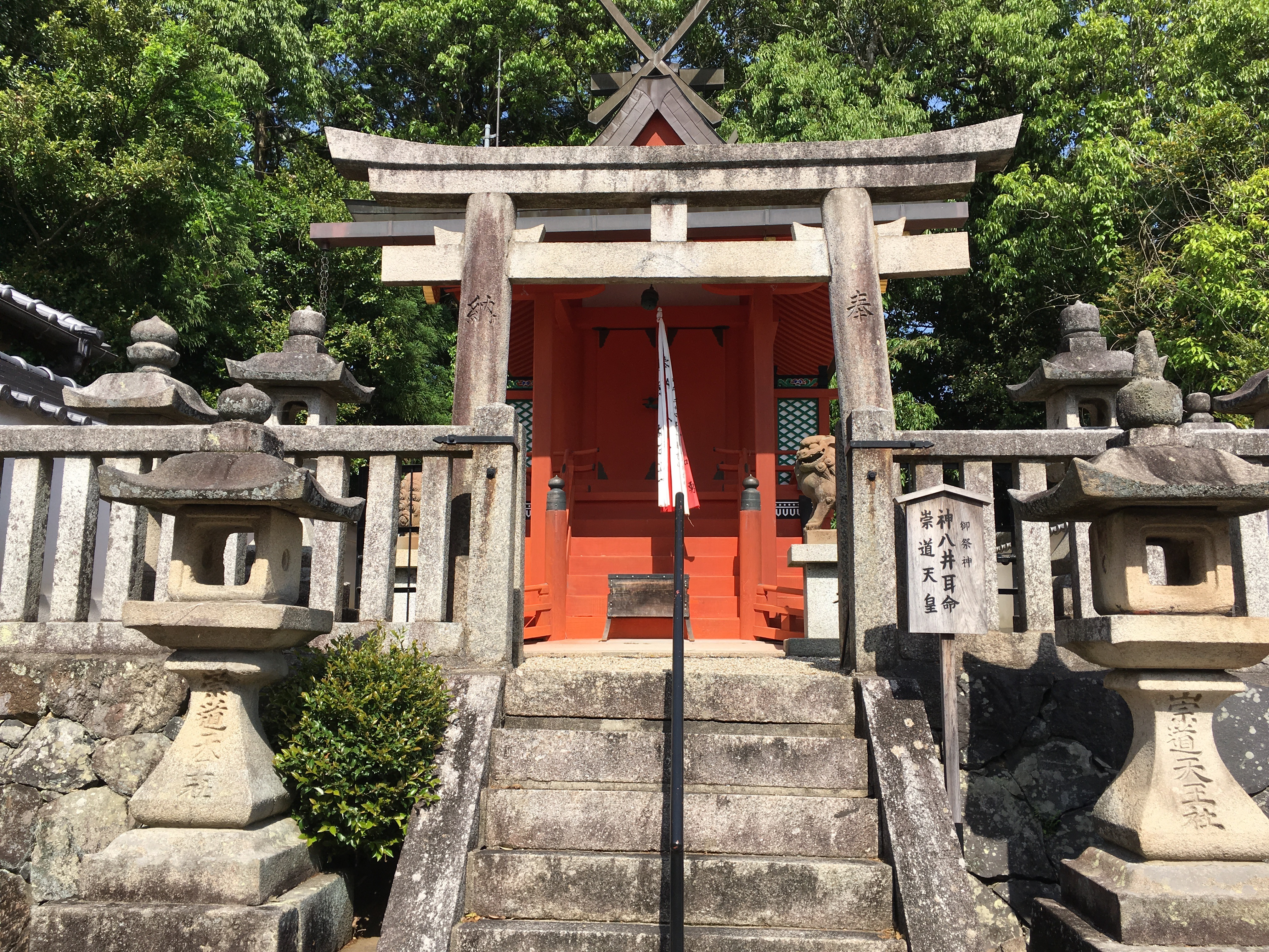 奈良 嶋田神社 境内から本殿